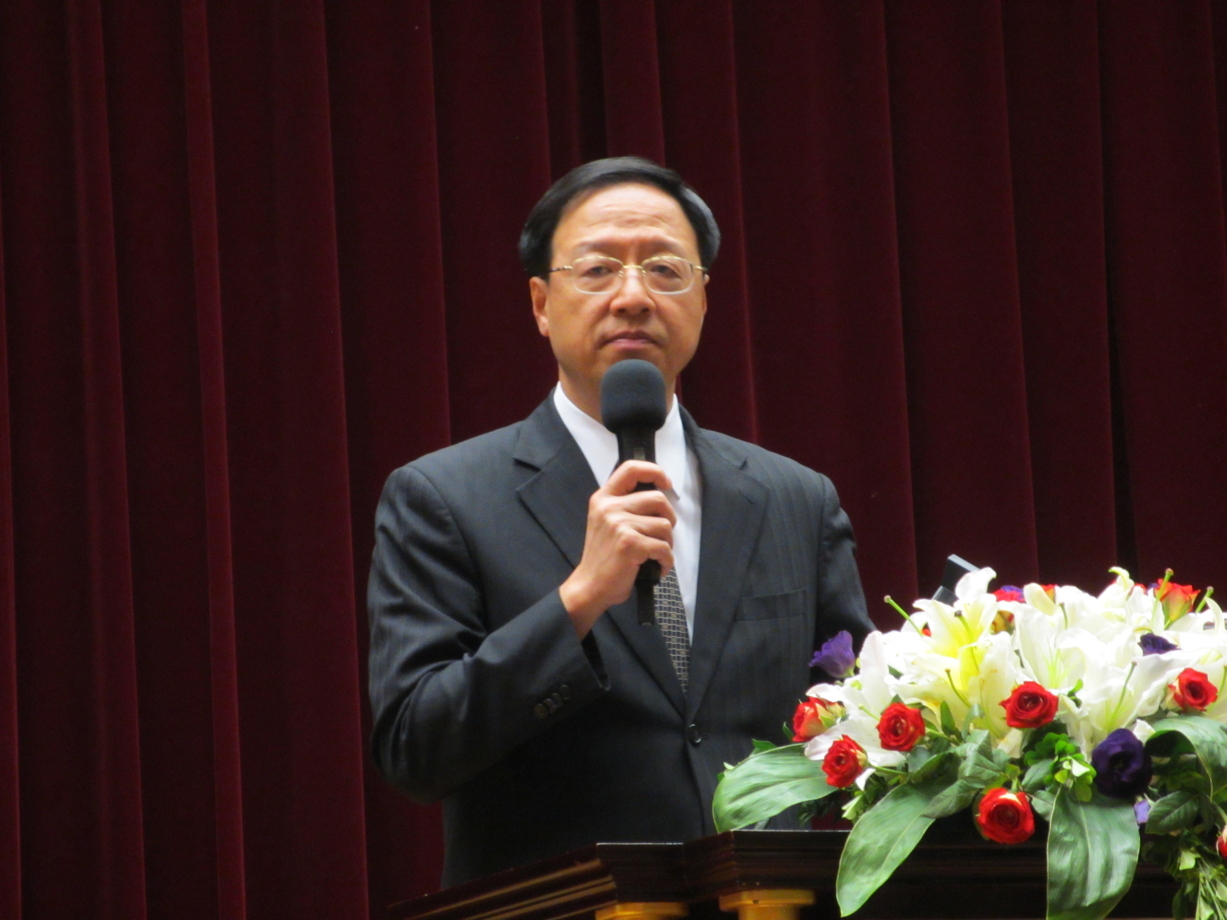 中華民國行政院院長江宜樺。